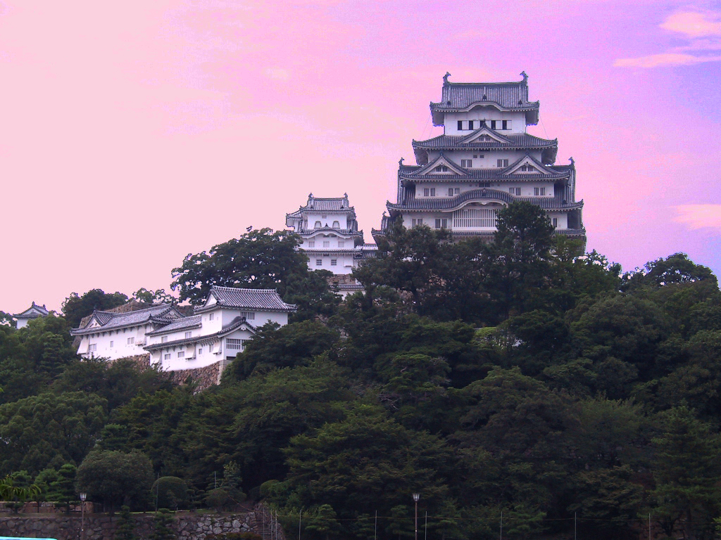 Himeji Castle, Himeji, Hyogo, Japan.